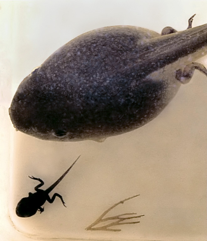 Kaulquappen der Erdkröte (unten; vierbeiniges Stadium kurz vor der Metamorphose) und der Knoblauchkröte (Hinterbeinstadium; nur der Rumpf sichtbar) im Größenvergleich. An der Knoblauchkrötenlarve erkennt man auch das an der linken Körperseite sitzende Atemloch als Ausstülpung.